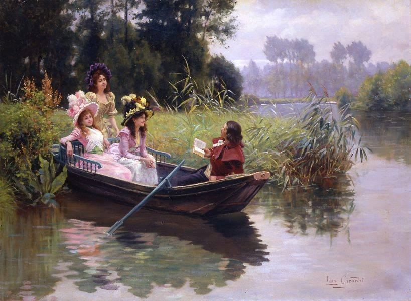 Le Poète